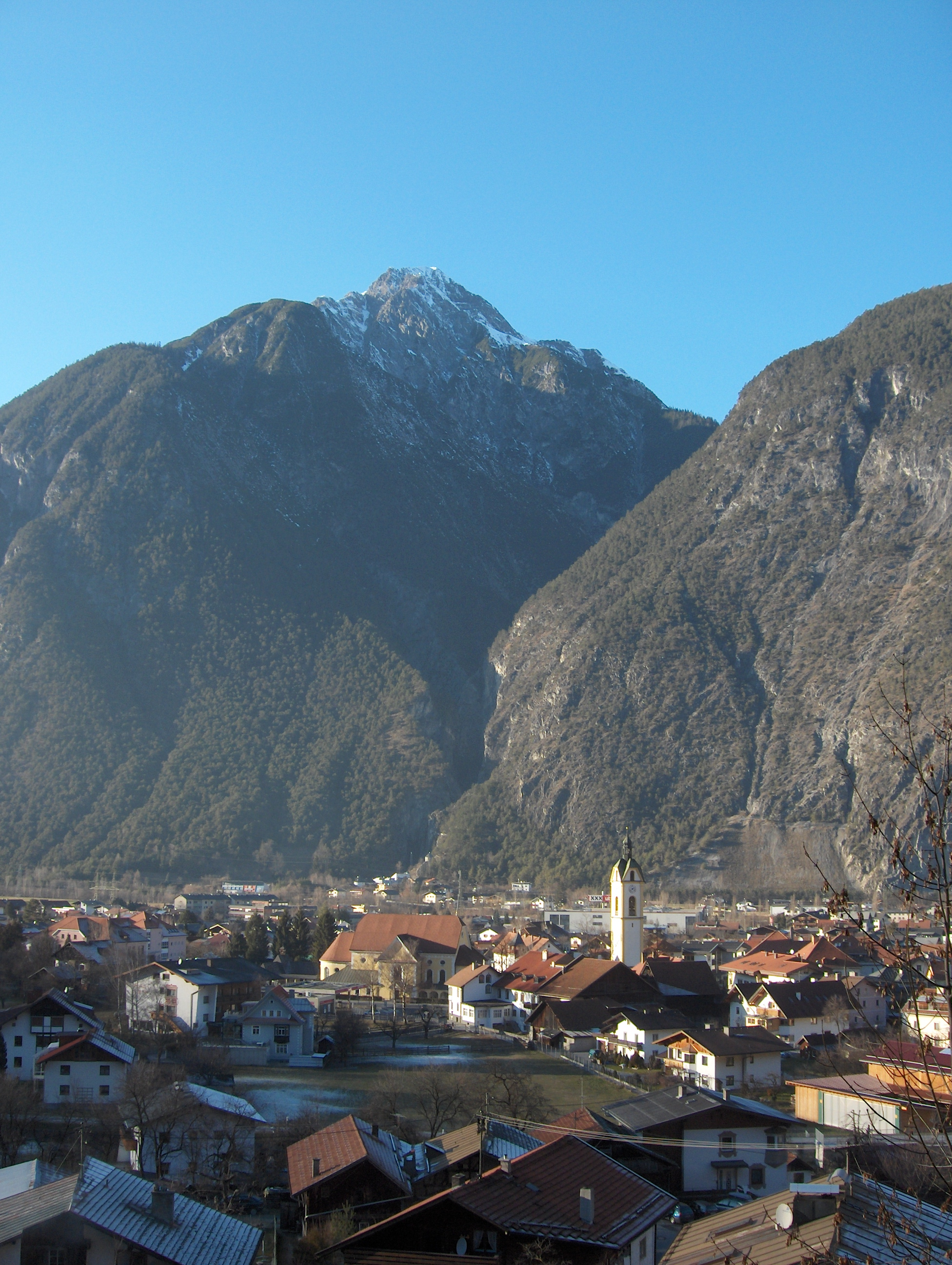 Blick auf Zams, hinten der Raue Kopf (2811 m) rechts daneben die Schlucht des Zammer Lochs und der Bergsporn der Hundsfalle (1684 m), Blickrichtung WNW